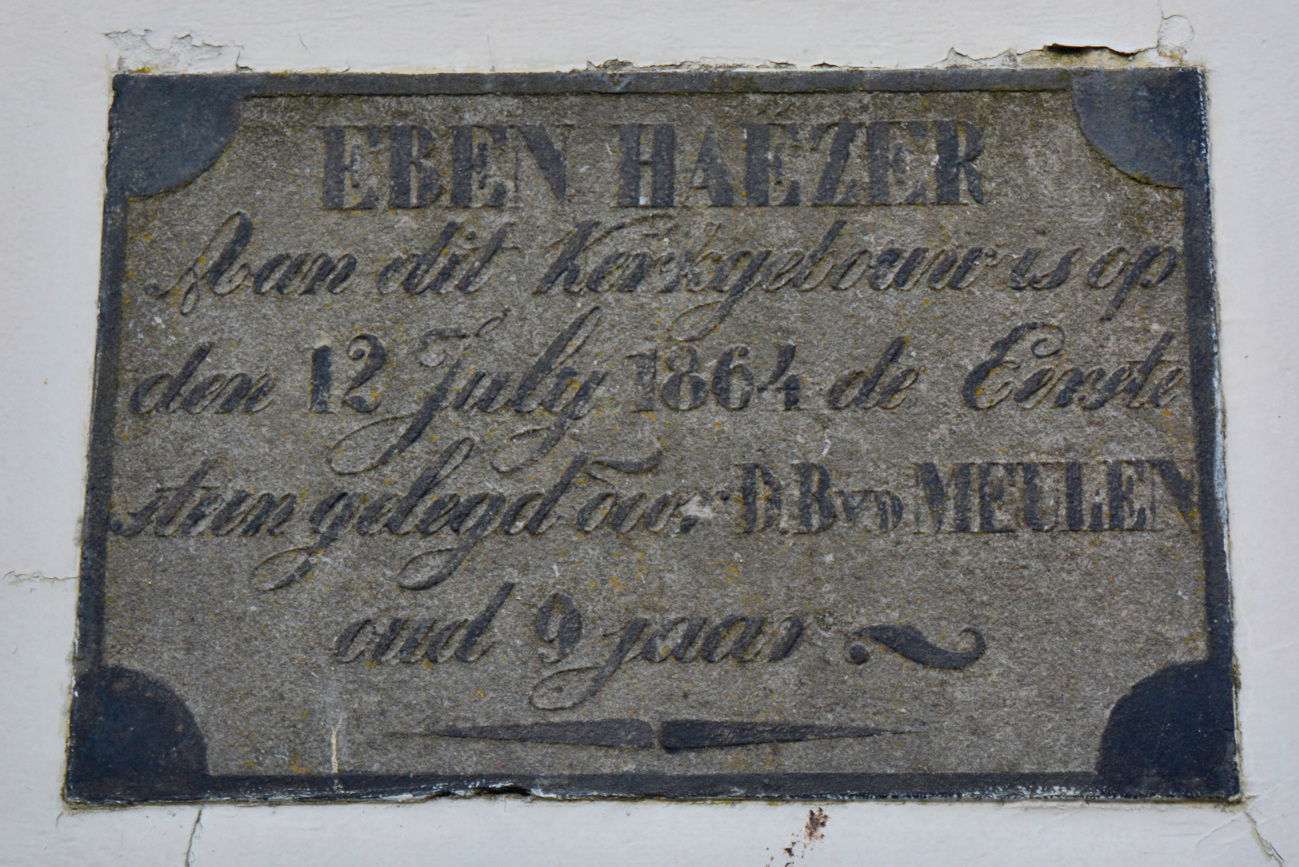 Suawoude, gevelsteen voormalige gereformeerde kerk